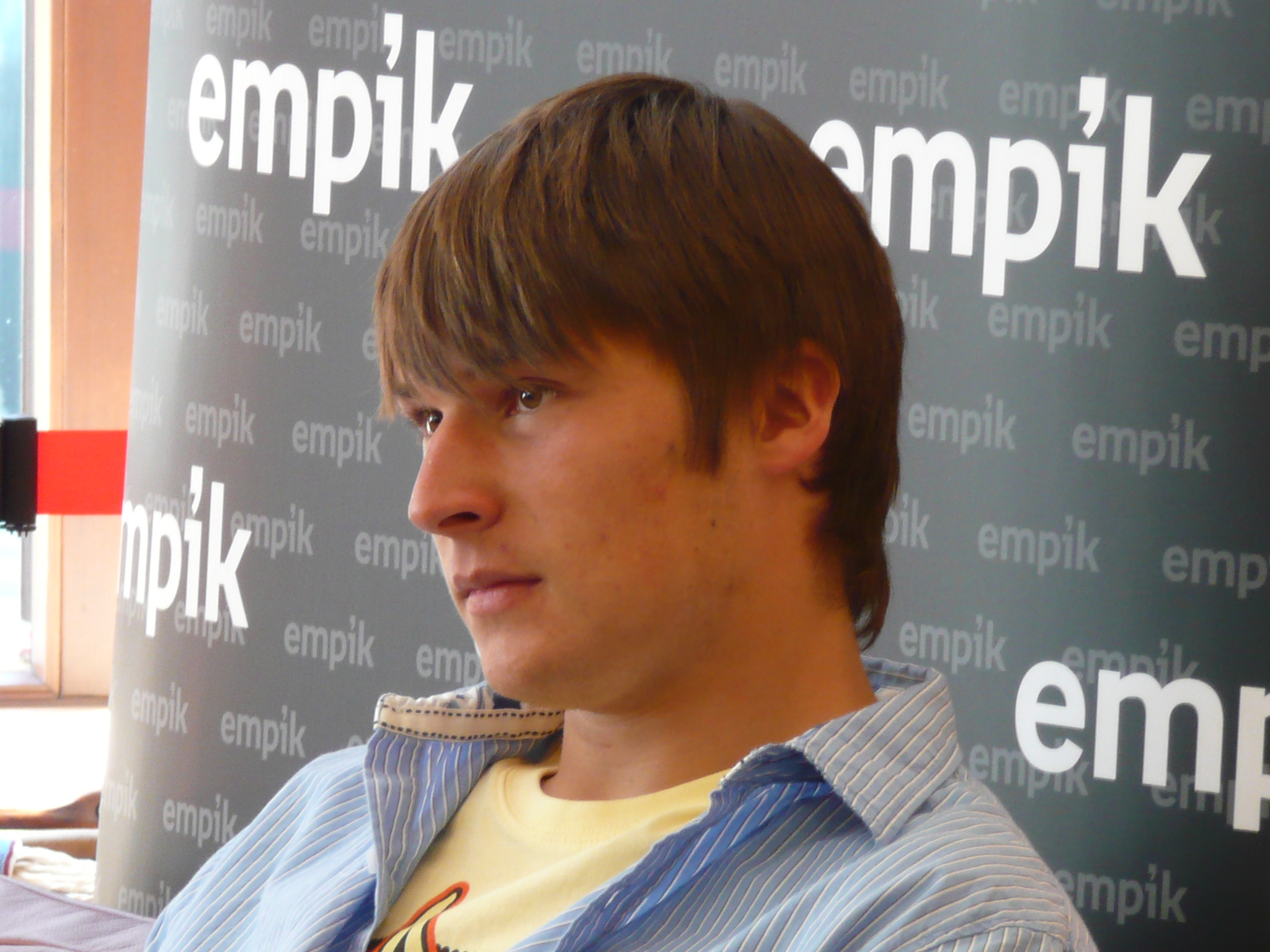 Robert Szpak (ur. 31 grudnia 1989 w Kołobrzegu) – polski lekkoatleta, oszczepnik, mistrz świata juniorów (Bydgoszcz, "Empik" 2009).